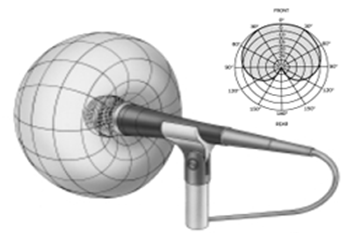 vese